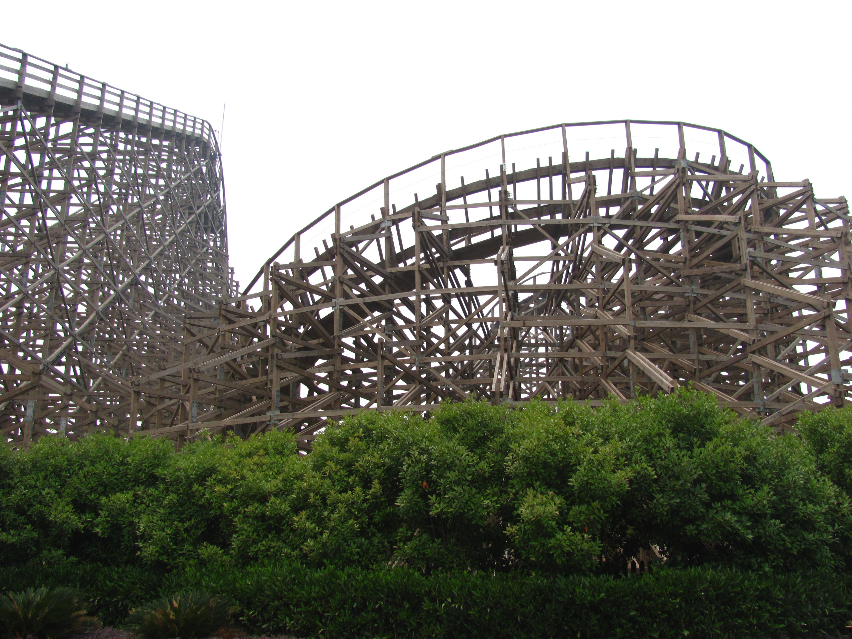 Happy Valley Shanghai